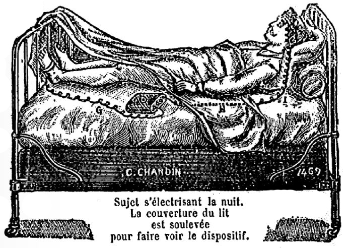 Gravure de frontispice d'un traité de Charles Chardin (1917), montrant l'appareil B121 relié par l'intermédiaire de deux fils à deux électrodes placées respectivement sur un pied et sur la tête du patient.